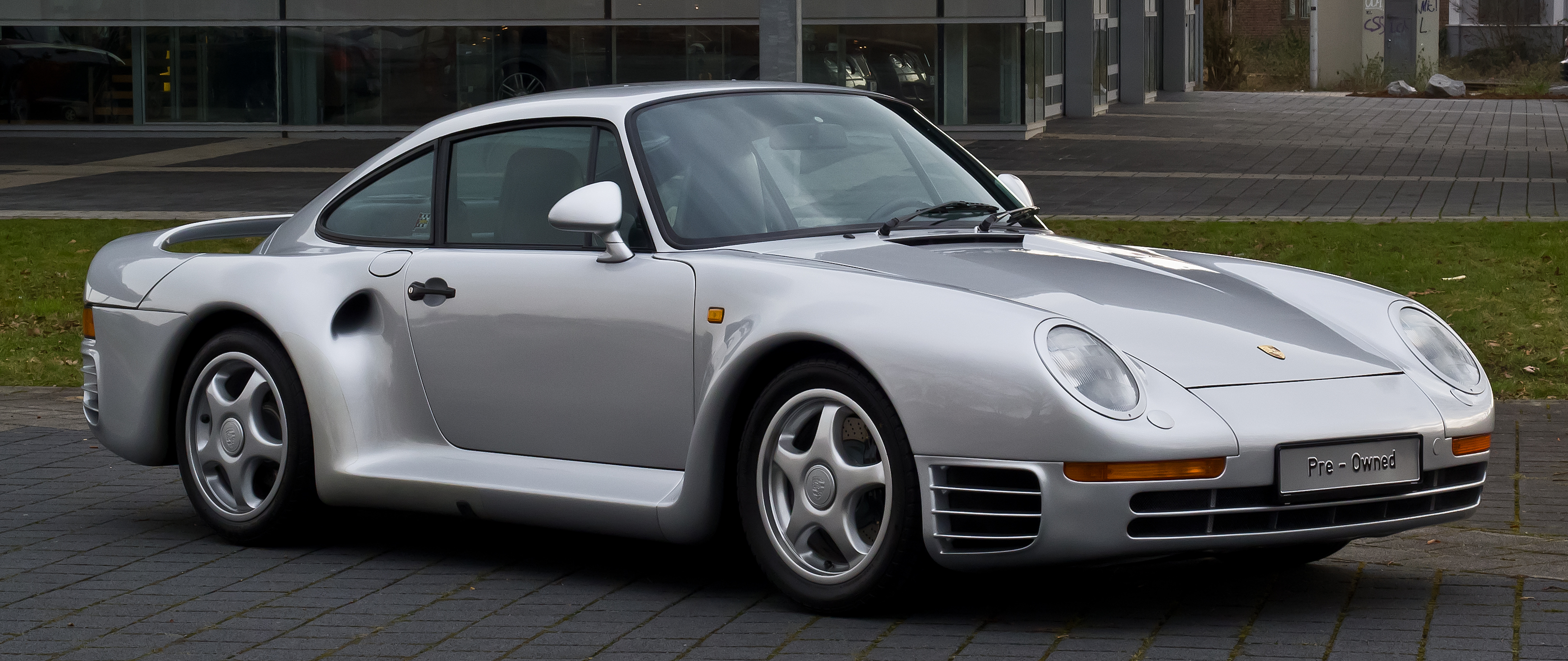 Frontansicht eines Porsche 959.